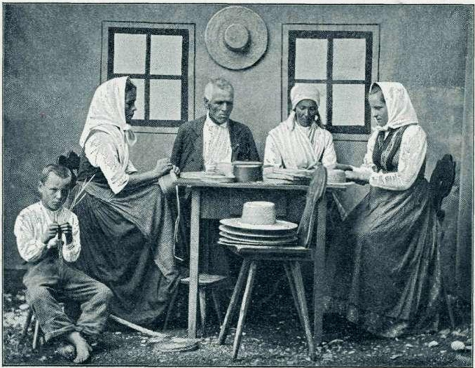 Domači obrti na Kranjskem - ihanski slamnikarji.